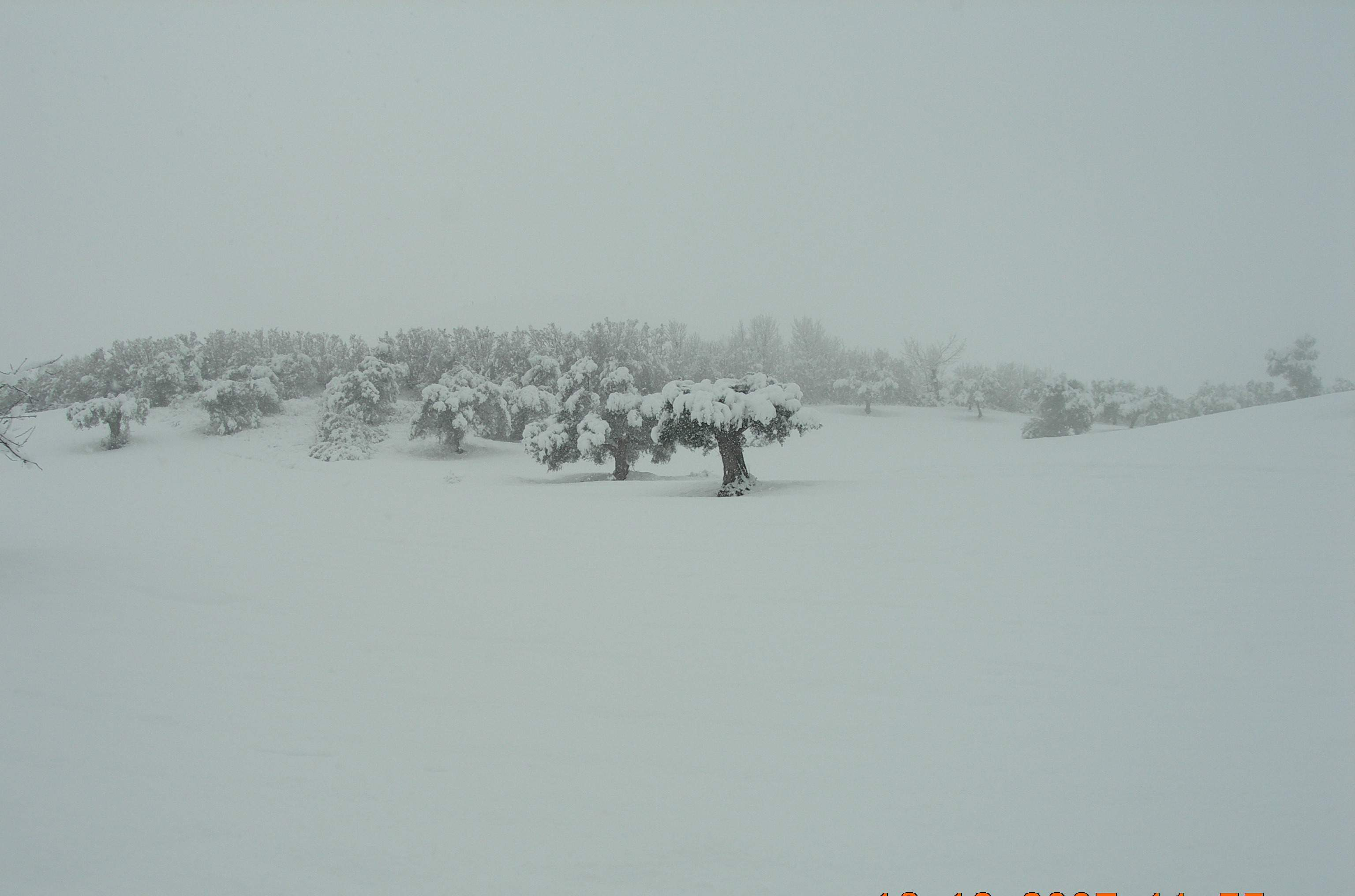 L'autore sono io e la fonte è la mia macchina fotografica digitale.